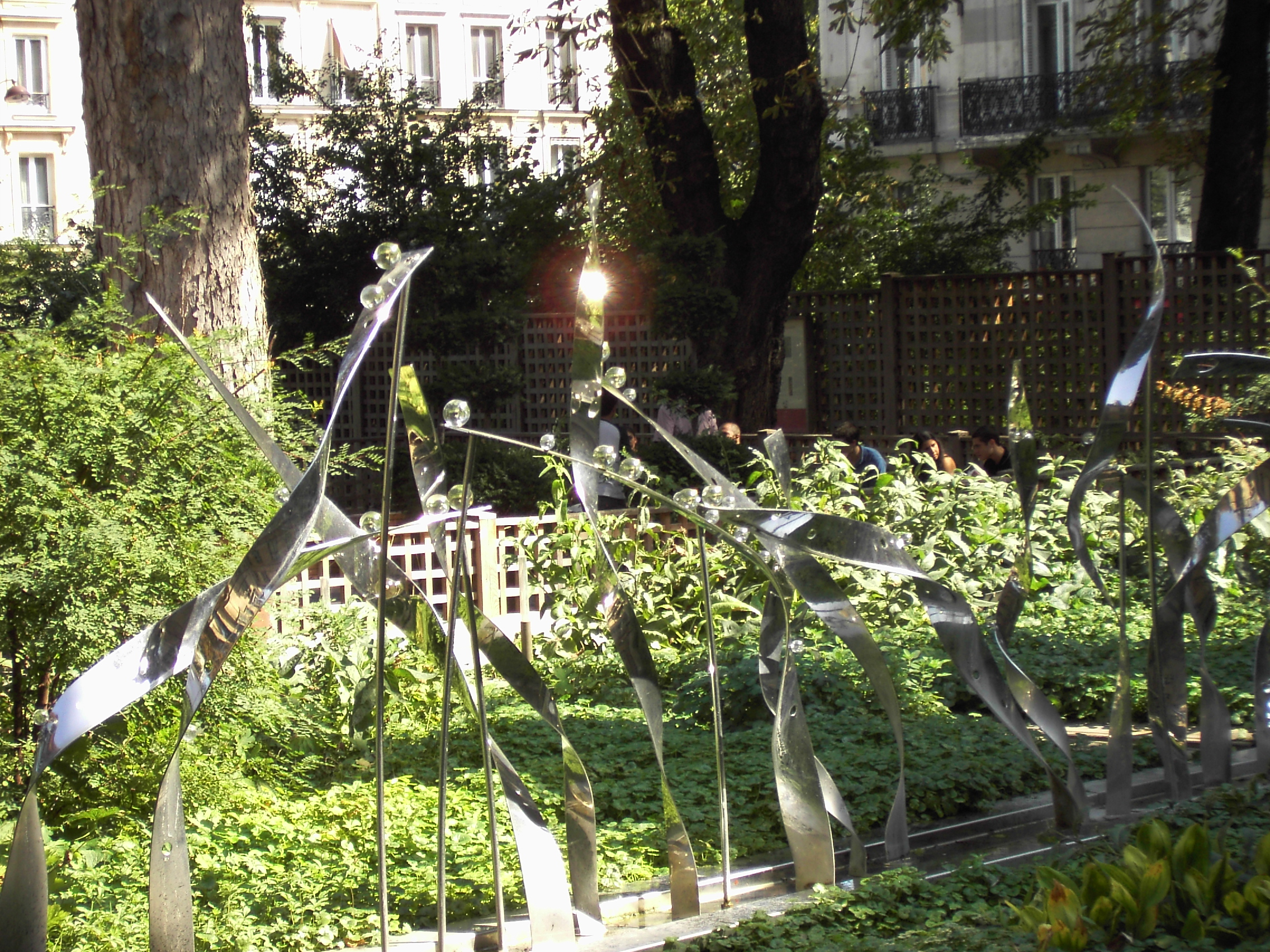 Paris, Hotel de Cluny, jardin: la roseraie by Lalupa